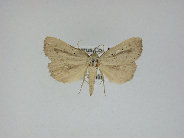 Gabara distema